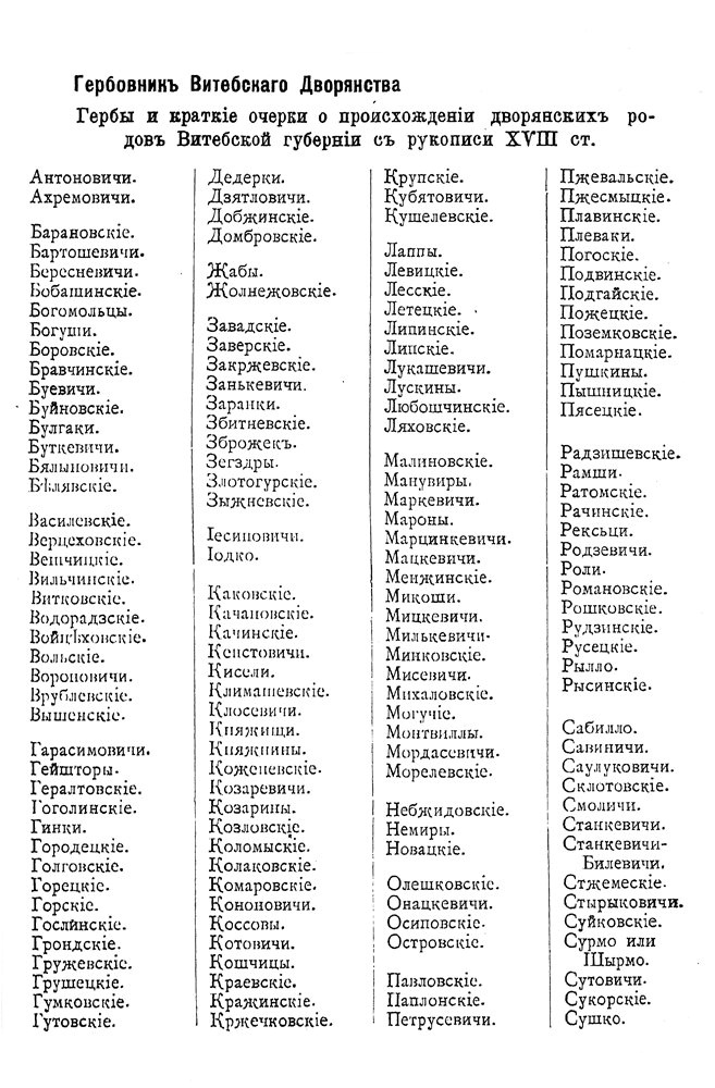 Гербовник Витебского дворянства. XVIII век